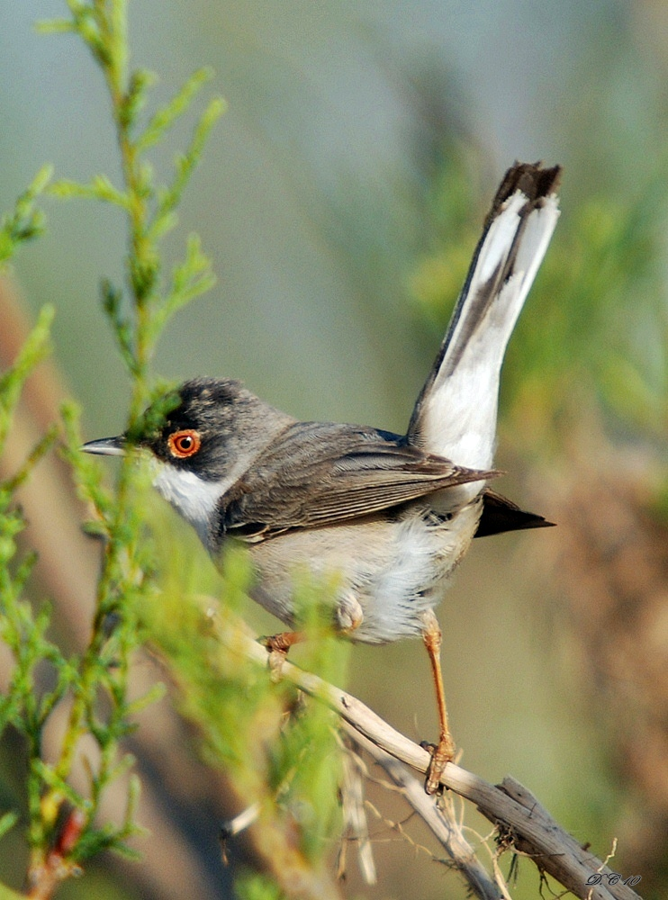 Kurdî: ...Latîn:Sylvia mystacea